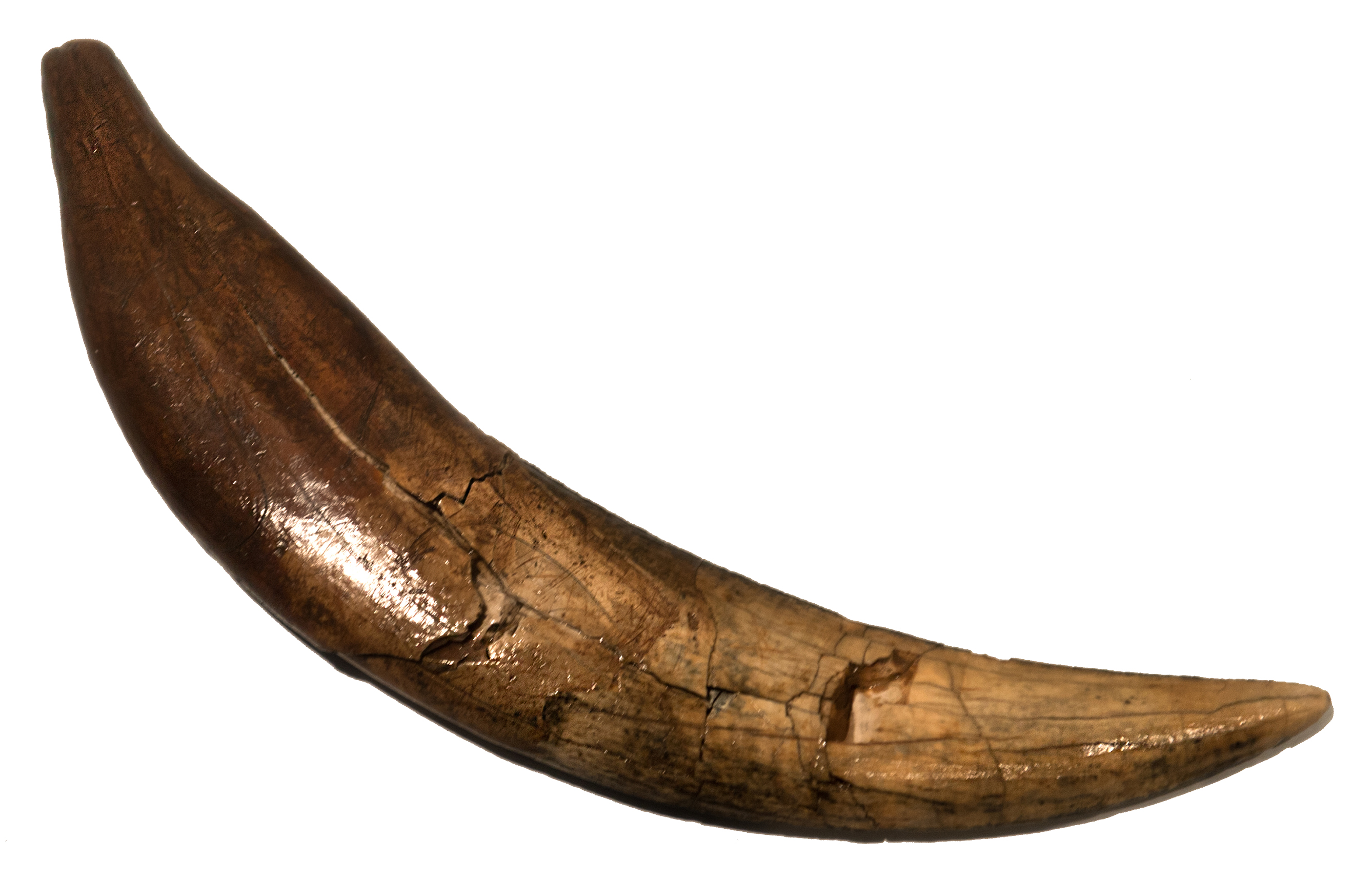 Colmillo de Smilodon "Tigre diente de sable" Sin datación. Sitio Arroyo del Vizcaíno. Comisión de Patrimonio de Canelones. Museo de Arte Precolombino e Indígena 25 de Mayo 279 Montevideo, Uruguay